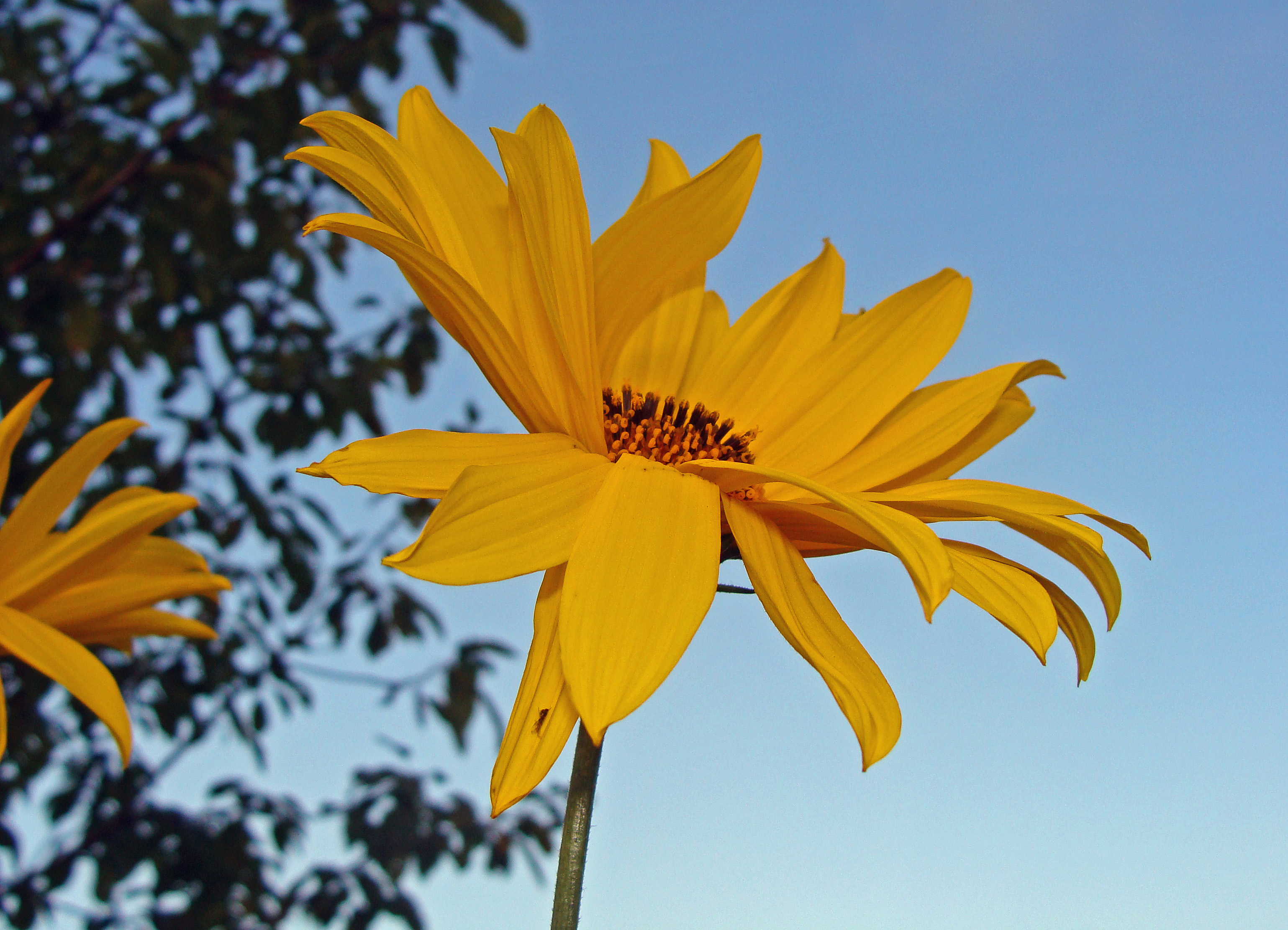 Hélianthi (Helianthus strumosus), fleur. Photographié en octobre 2013 à Carling, rue Charles July.